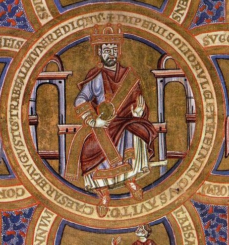 Ausschnitt aus dem Widmungsbild des Evangeliars für Montecassino, Ottob. lat. 74